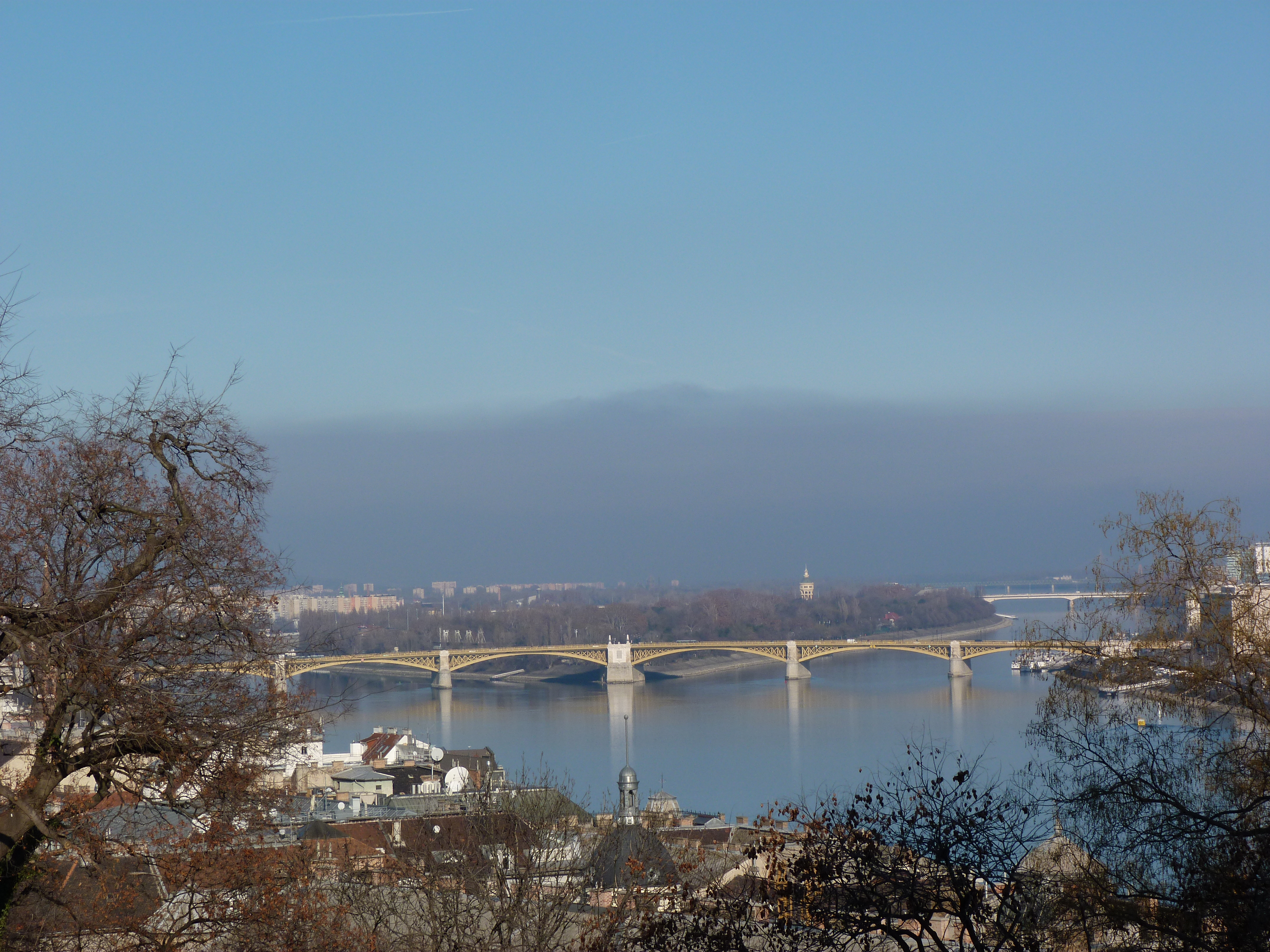 A felvétel 2014. január 6 -án hétfőn készült Budapesten, a Budai Várban. Hidegpárna (inverzió - fordított rétegződés) a Margitsziget felett. ©© Derzsi Elekes Andor, Budapest, 2014, A kép és filmfelvételek egészben, vagy részletekben másolását, bármilyen úton történő sokszorosítását és felhasználását a szerző ellenérték nélkül, jogutódjaira is kihatóan megengedi. Az engedély kiterjed a kereskedelmi célú hasznosításra is. Kéri azonban nevének feltüntetését a felhasználás során. A Metapolisz sorozat valamennyi képe és filmje Creative Commons alatti valamint kereskedelmi - for profit - célra is felhasználható. Ajánlott hivatkozás: Derzsi Elekes Andor: Metapolisz DVD line Forrás